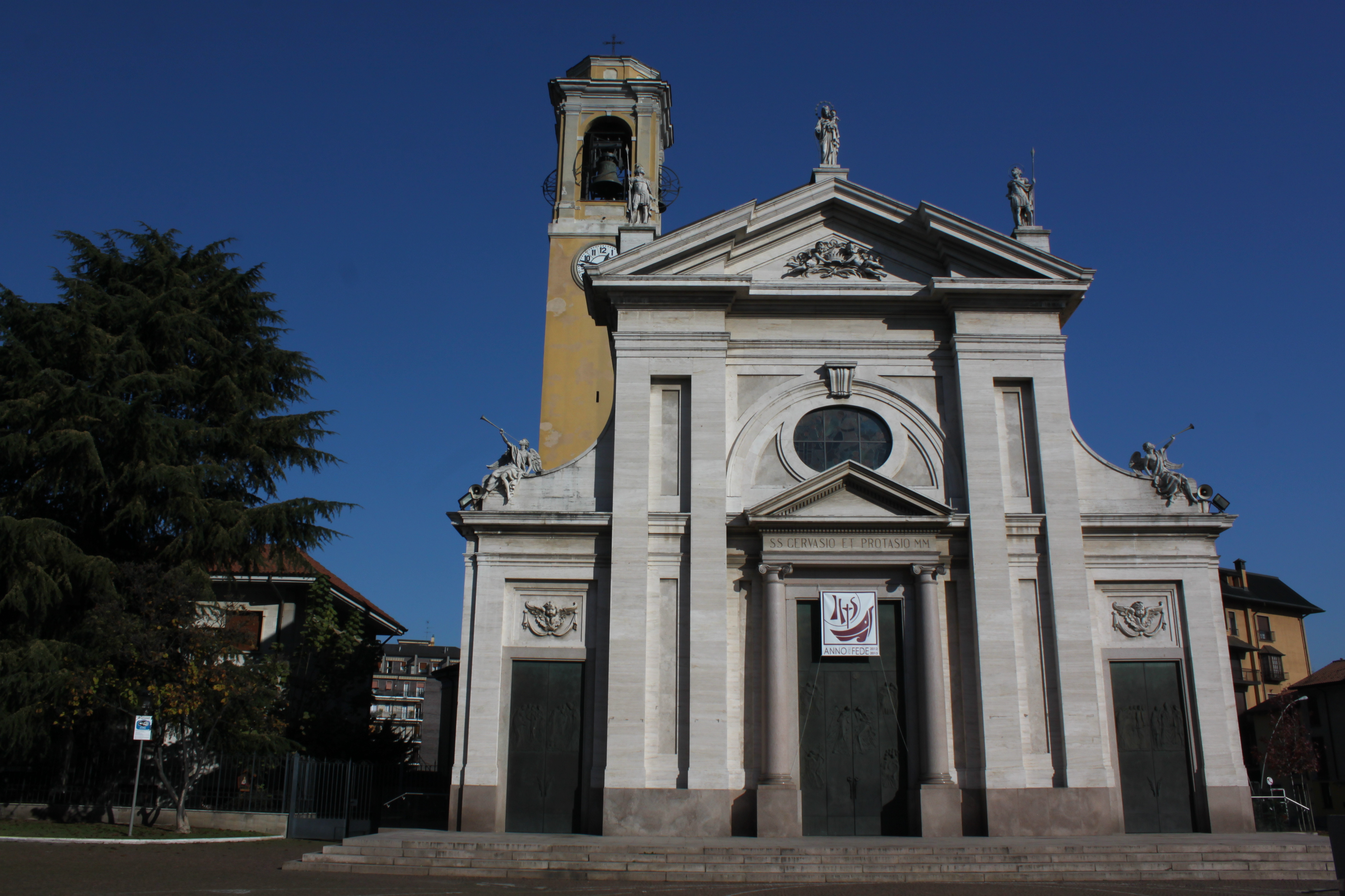 Chiesa dei SS. Gervaso e Protaso e piazza Maggiolini This is a photo of a monument which is part of cultural heritage of Italy.